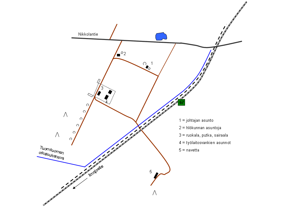 Ilmajoen työlaitos, kartta